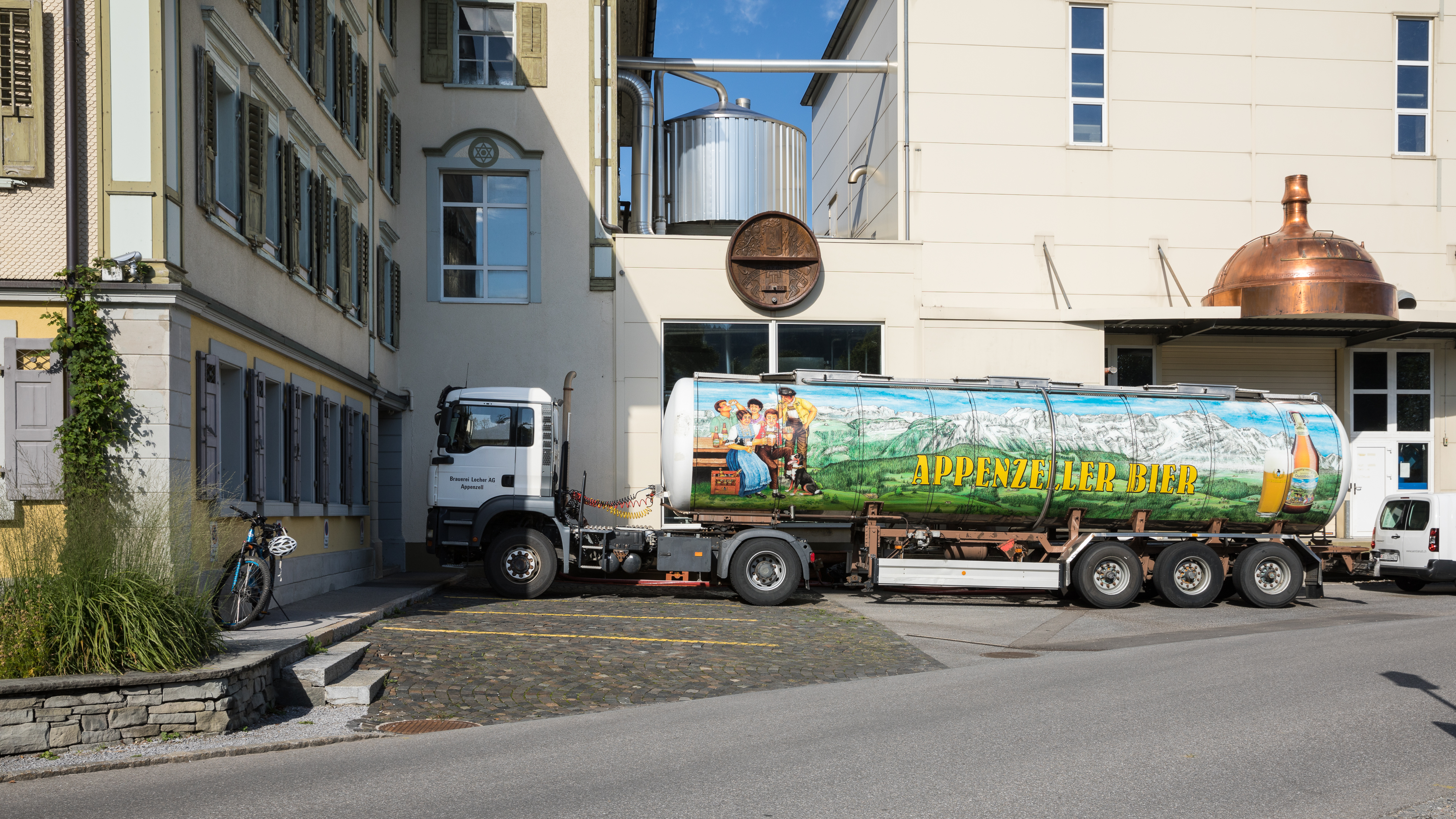 Biertanksattelzug bei der Brauerei Locher in Appenzell